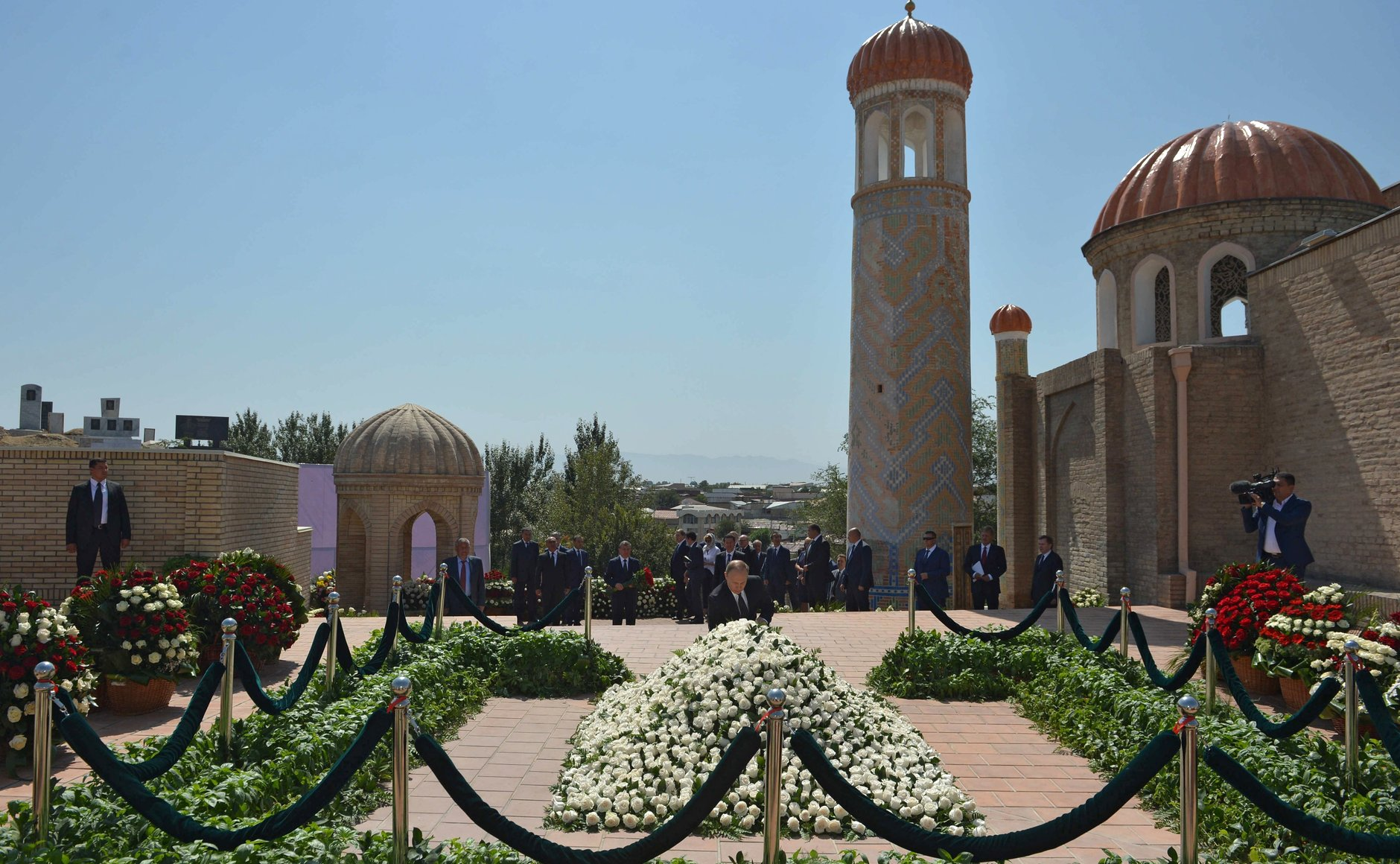 Возложение цветов Президентом России Владимиром Путиным к месту захоронения Ислама Каримова